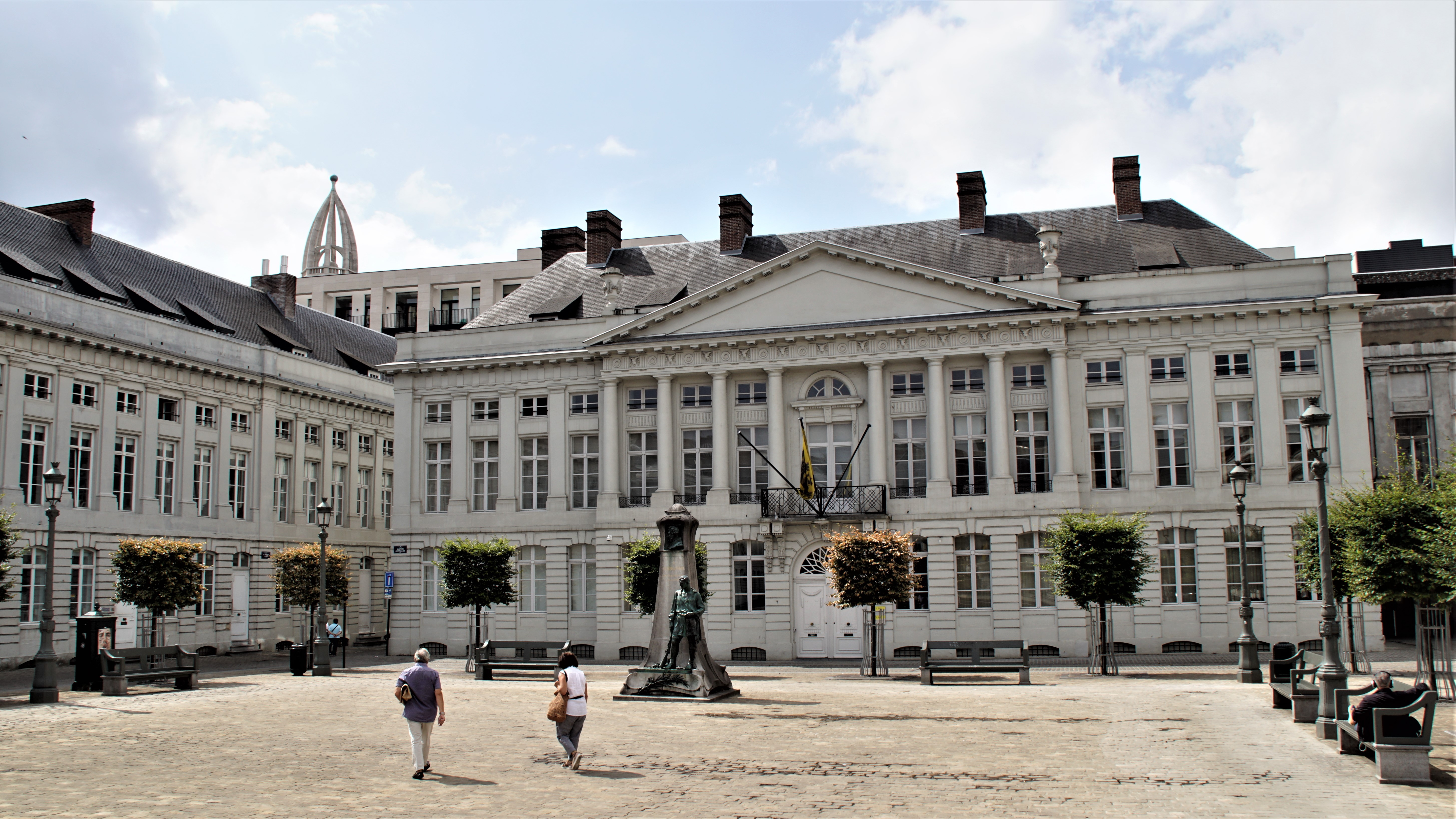 Het epicentrum van de Vlaamse politiek ligt aan de Nieuwstraat van Brussel. Een vaak vergeten, toeristisch pareltje in centrum Brussel dat ik mijn vrienden graag liet ontdekken. This photo of immovable heritage has been taken in the Brussels Capital Region